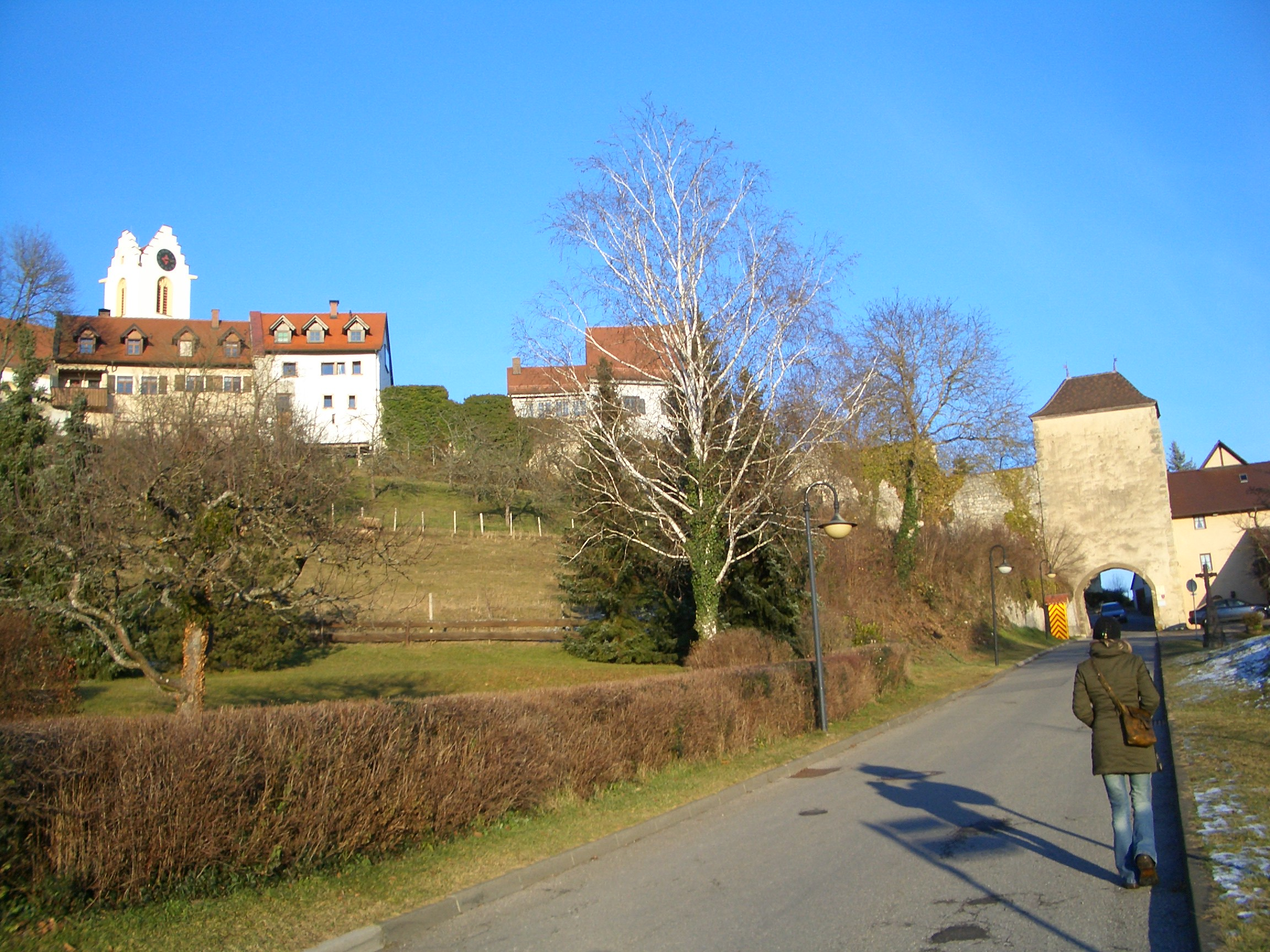 Aach